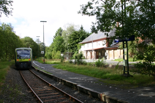 Triebwagen Regio-Shuttle RS1 der agilis Verkehrsgesellschaft im Haltepunkt Helmbrechts.